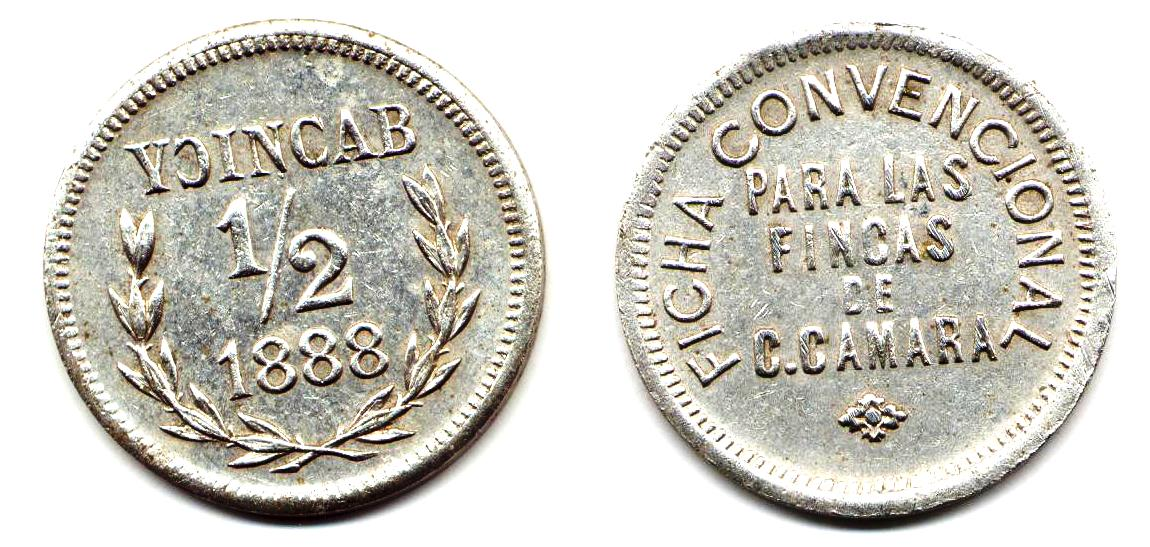 Ficha por medio real de la Hacienda Itzincab Cámara, Yucatán de 1888.